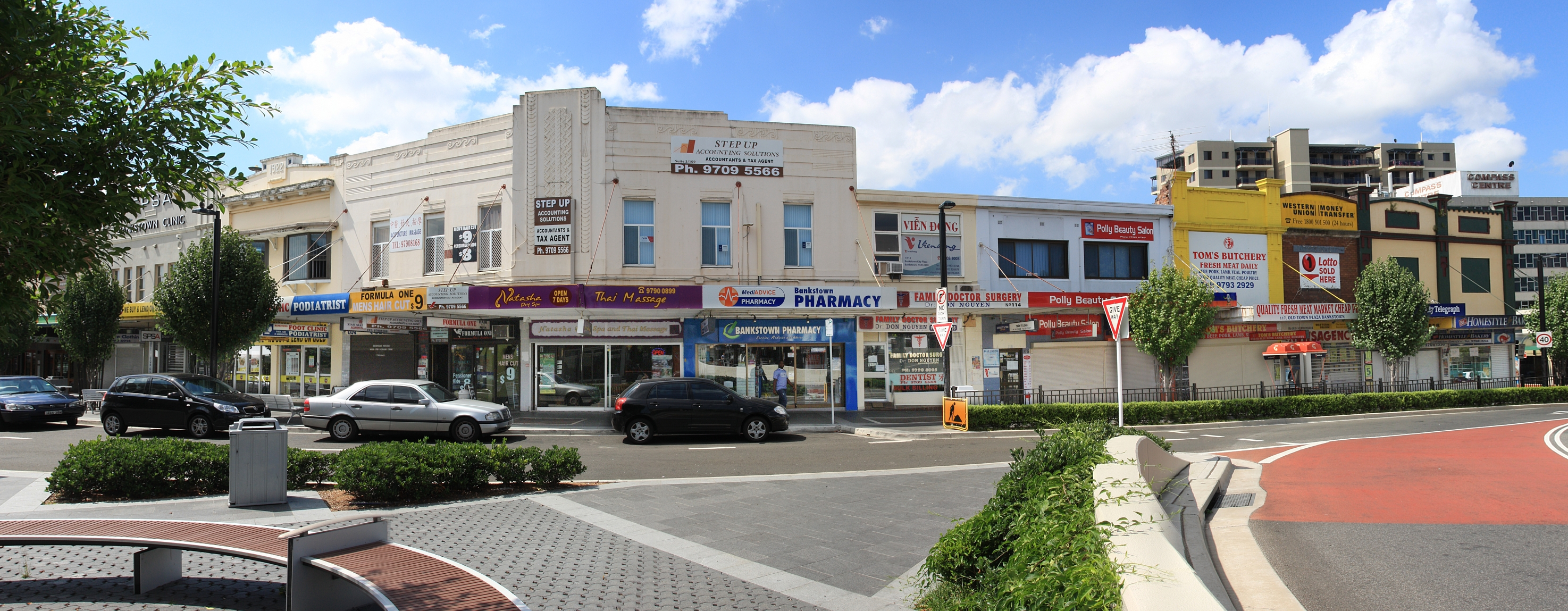 Bankstown Plaza